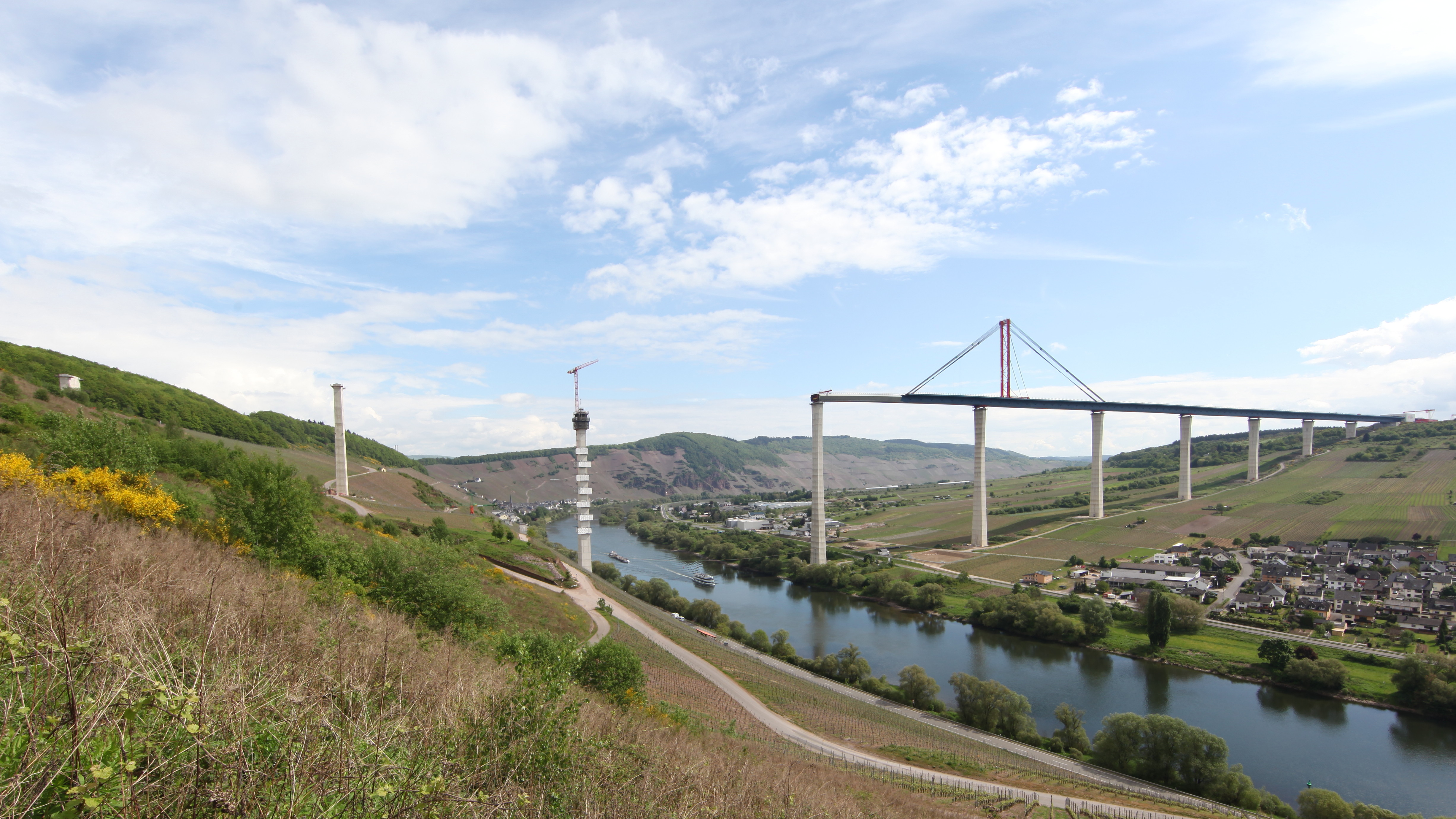 Hochmoselbrücke